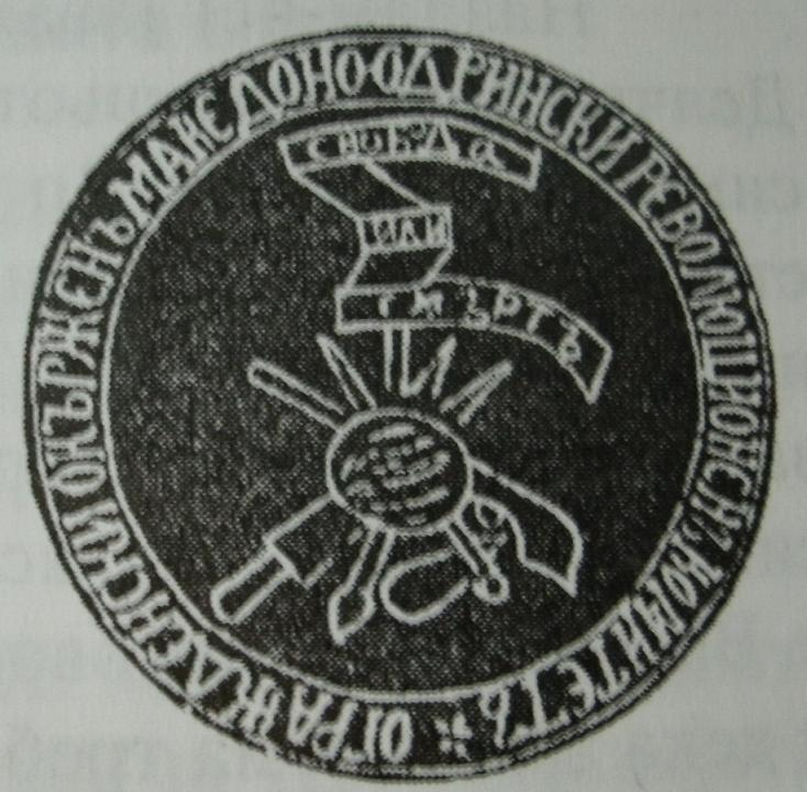 Печат на Струмишкия революционен окръг на ВМОРО.